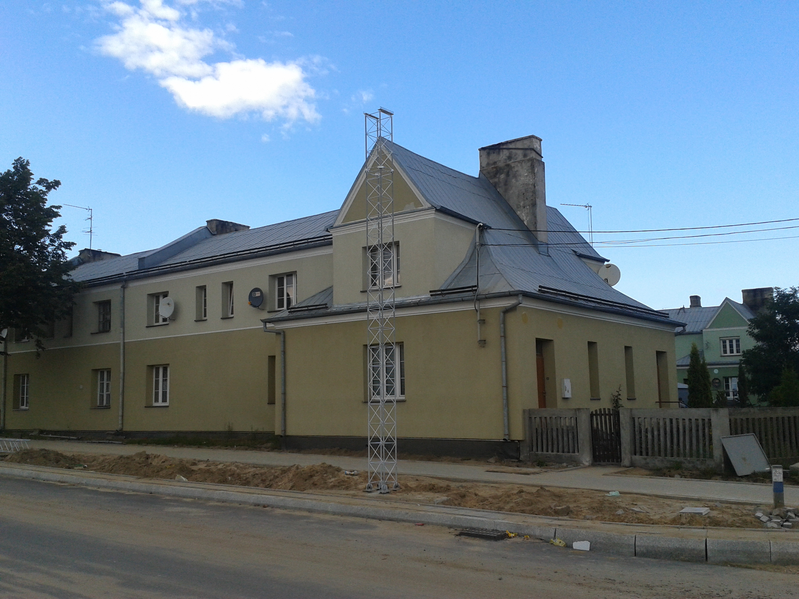 Przedwojenne domy urzędnicze na osiedlu Wygoda